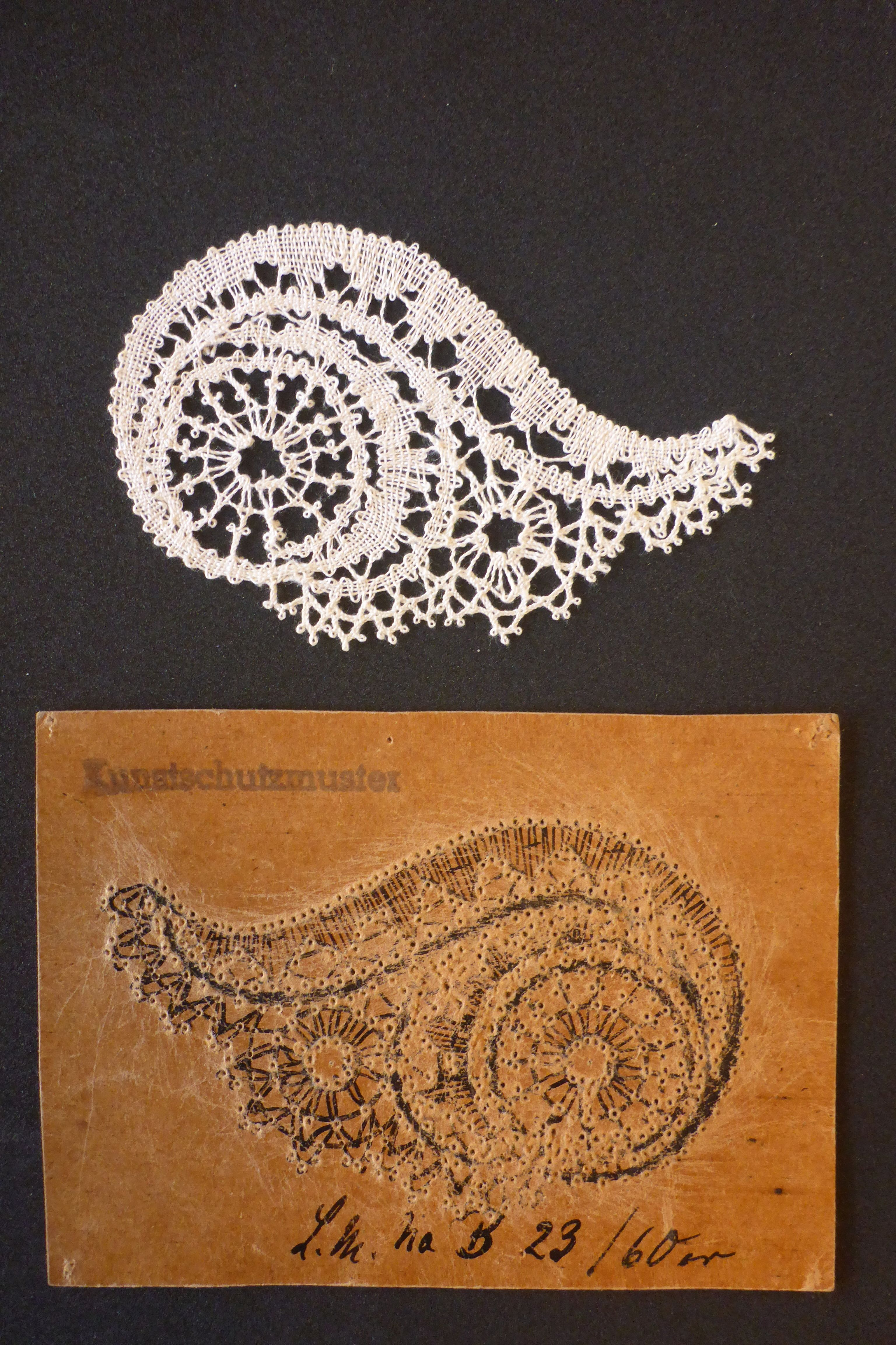 Klöppelbrief und Klöppelspitze